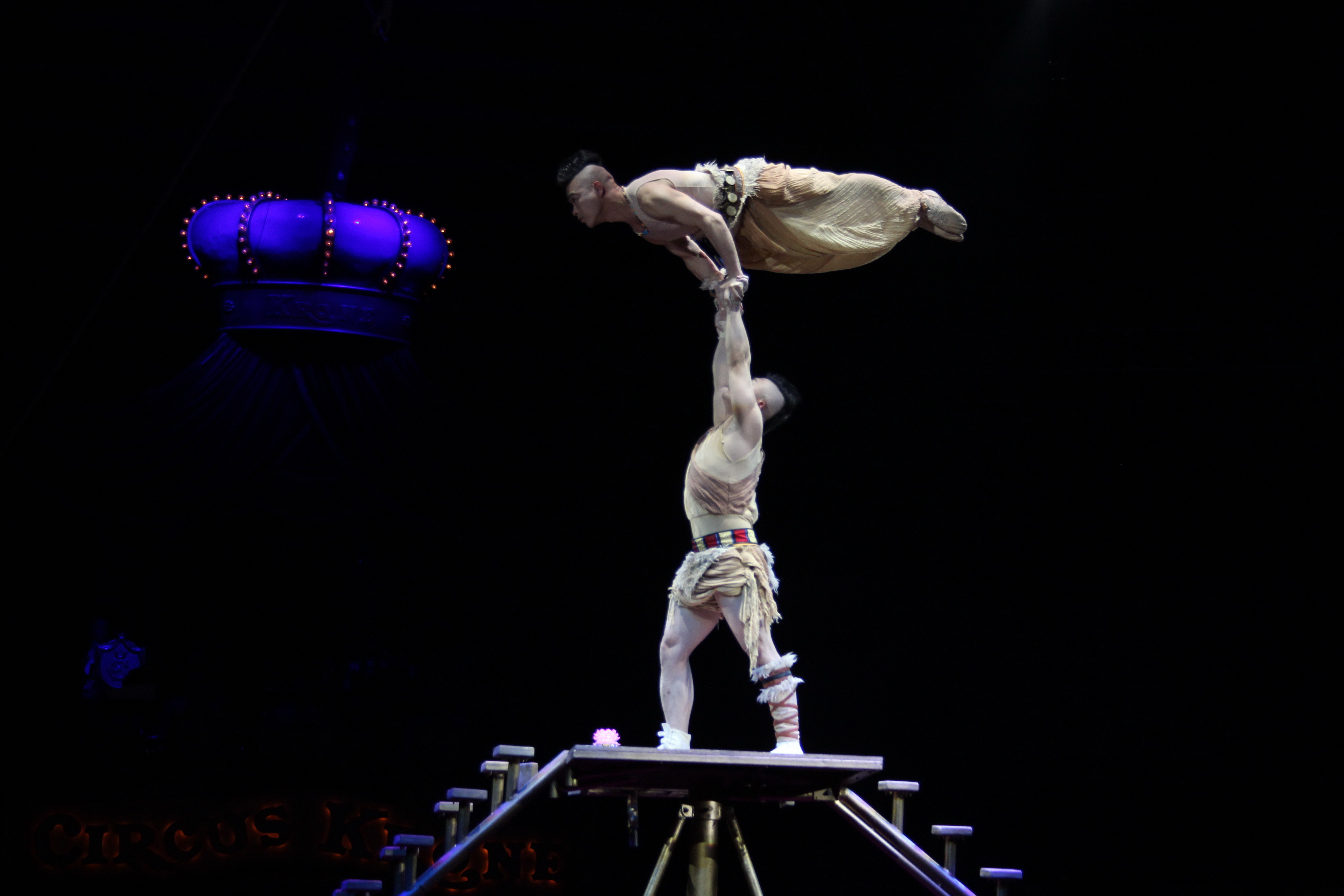 DUO SUE NING, Handstandartisten aus China im Circus Krone